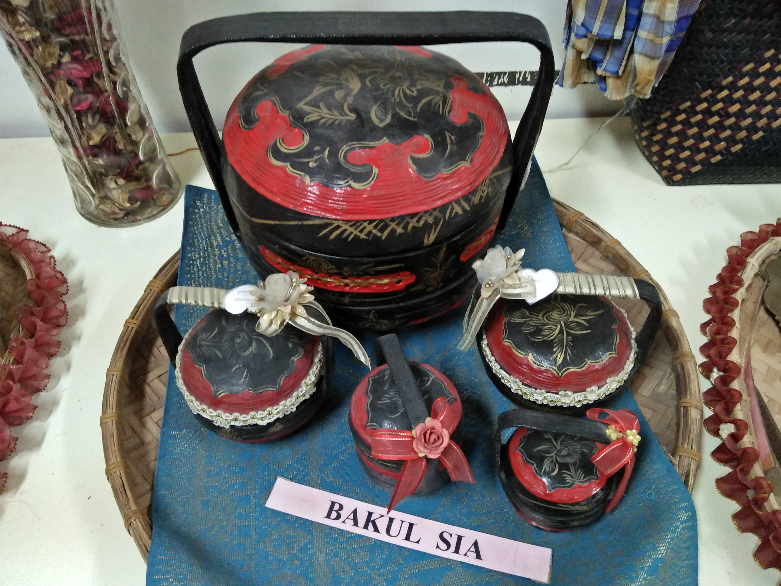 Bakul ini merupakan alat menyimpan makanan bagi masyarakat Baba dan Nyonya